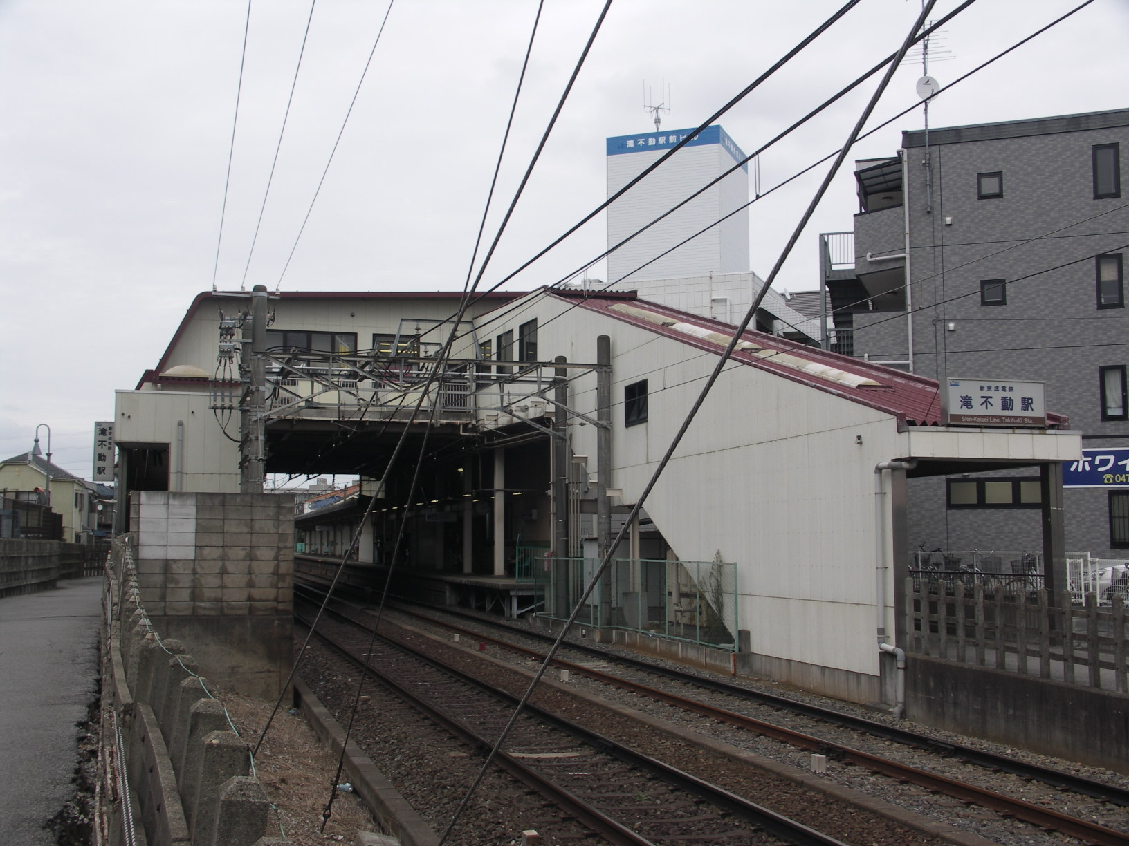 Takifudo station, Shin-Keisei Line, Chiba, Japan, 滝不動駅